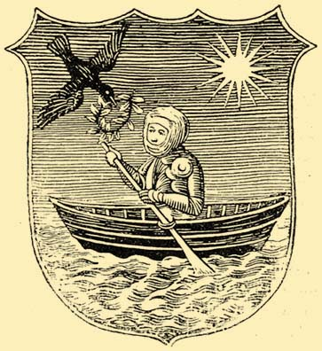 A Brodarics címer.